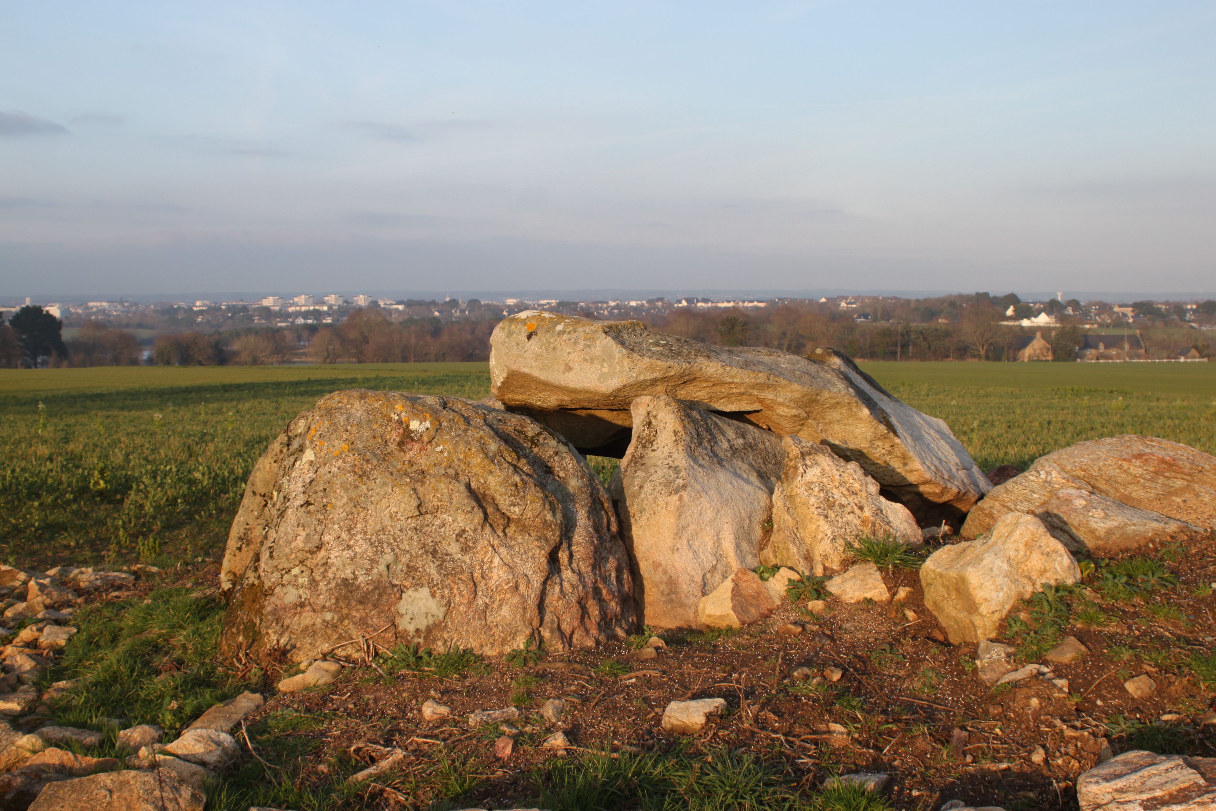 Dolmen de Kerhenry, Fr-56-Arradon.